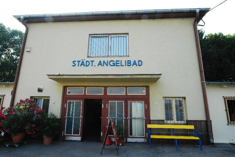 Das Strandbad Angelibad oder kurz nur Angelibad ist ein städtisches Sommerbad am rechten Ufer der Alten Donau im 21. Wiener Gemeindebezirk Floridsdorf unterhalb des Floridsdorfer Wasserparks.